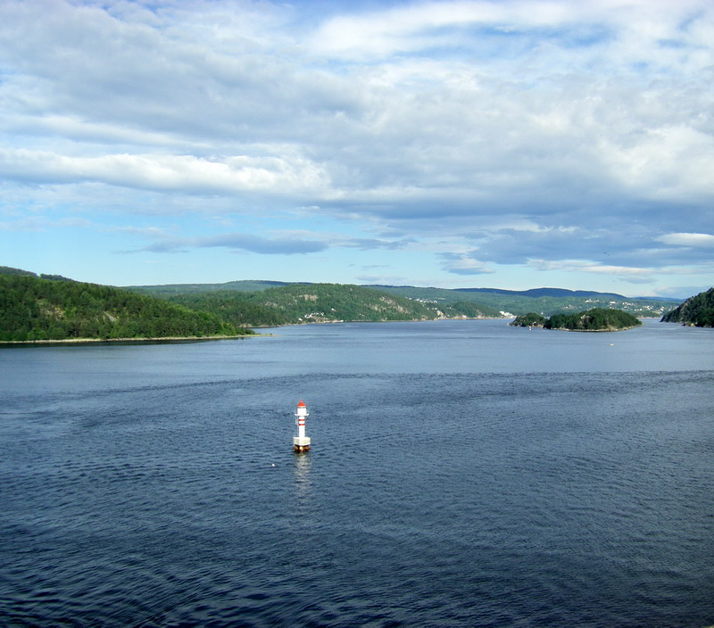 Vestfjorden sett fra Drøbakgrunnen, Bergholmen og Kloasundet til høyre